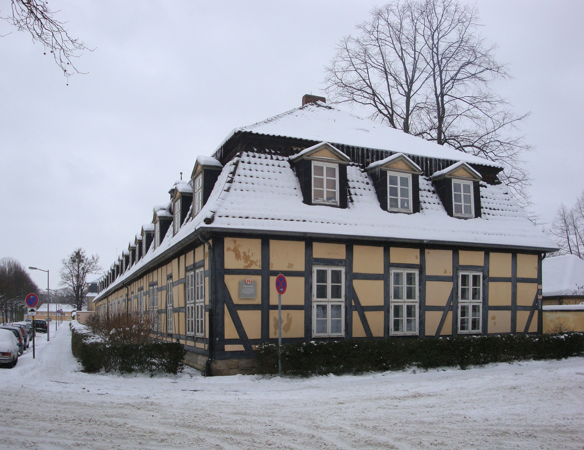 Im Ensemble mit Großer Garten mit Herrenhäuser Allee, Herrenhäuser Straße 3 (Orangerie), 3a (Galerie), Am Großen Garten/In der Steintormasch (Friederikenbrücke über die Graft).